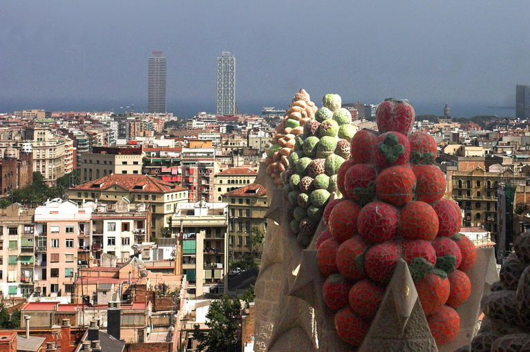 Pinacles del costat sud de la nau central decorats amb fruits. (Sagrada Familia-Barcelona-Catalunya)